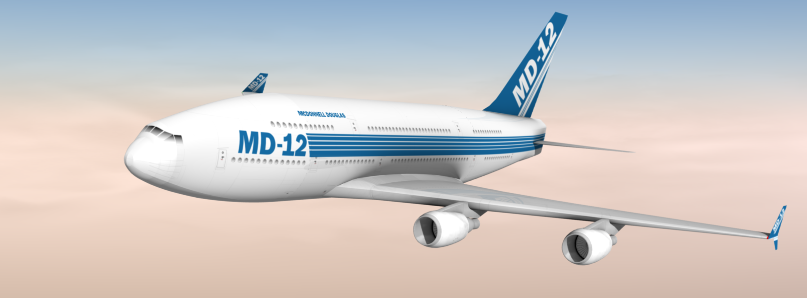 MD-12